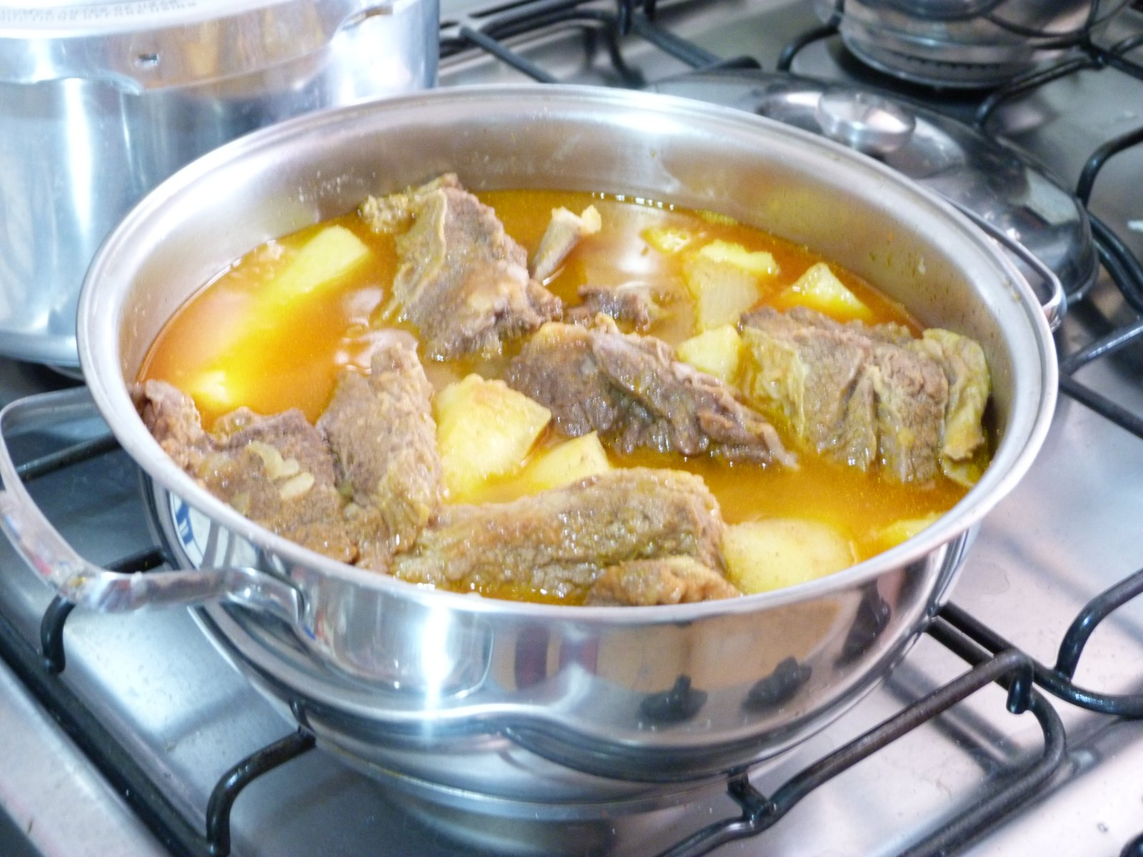 Almoço de domingo